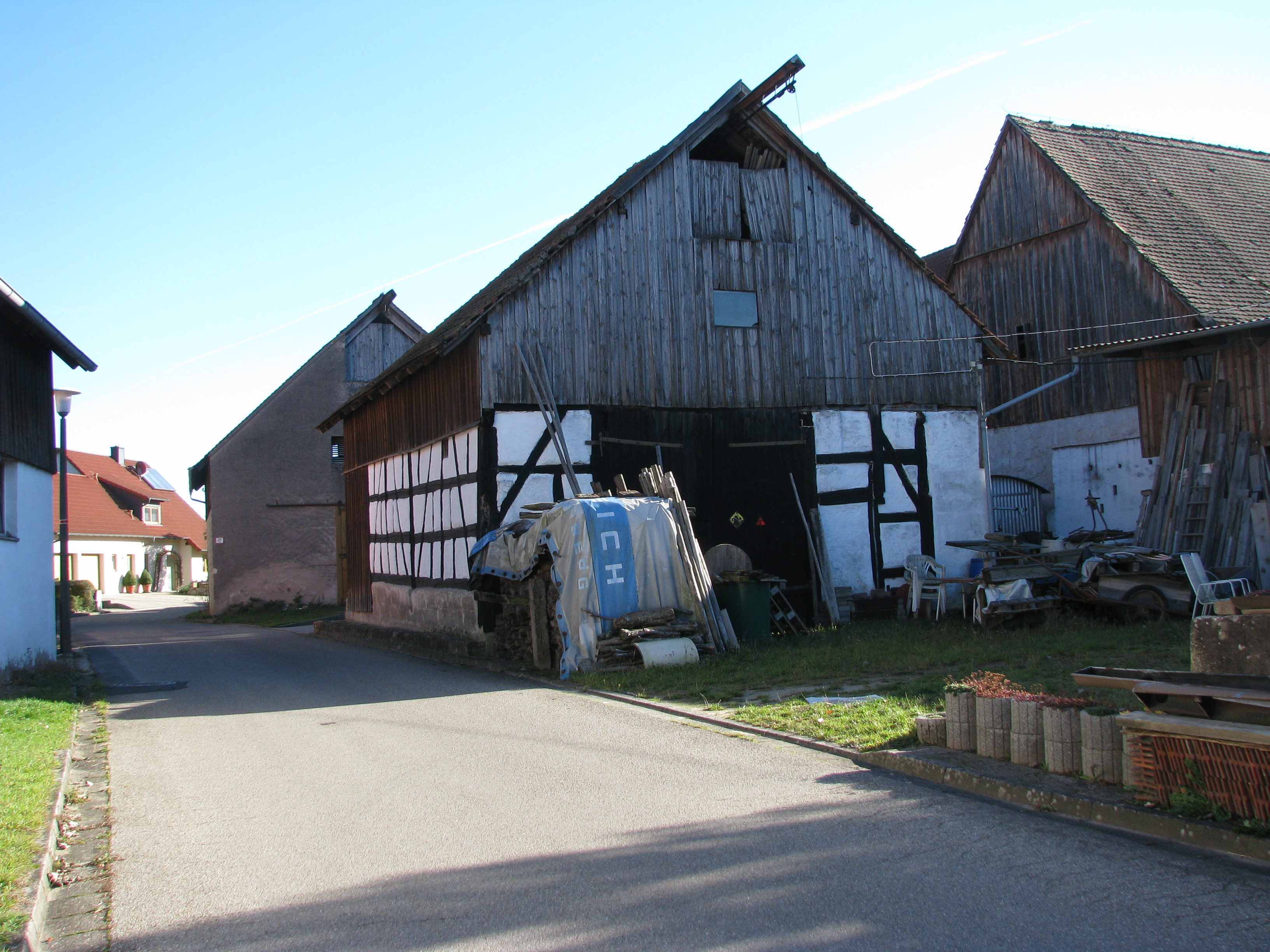 Unterrödel, Ortsteil von Hilpoltstein im mittelfränkischen Landkreis Roth, Fachwerkscheune